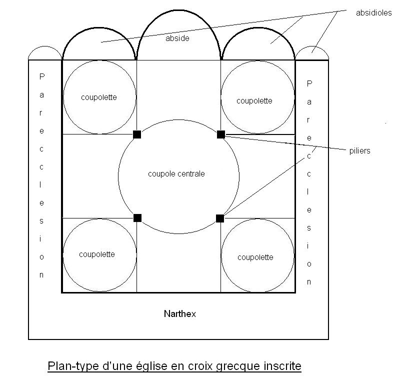 Schéma réalisé par moi-même d'un plan-type d'église en croix grecque inscrite